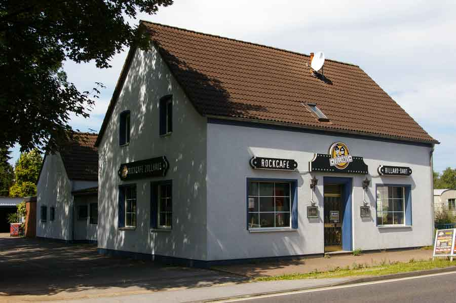 Gaststätte Zollhaus in Richrath